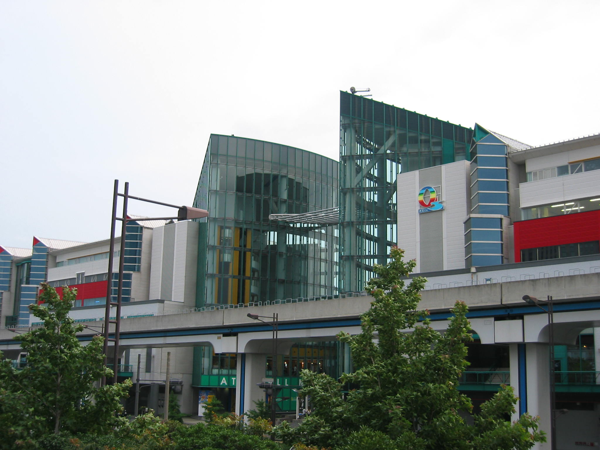 ATC-2。2004年8月5日、利用者:ユニによる撮影。